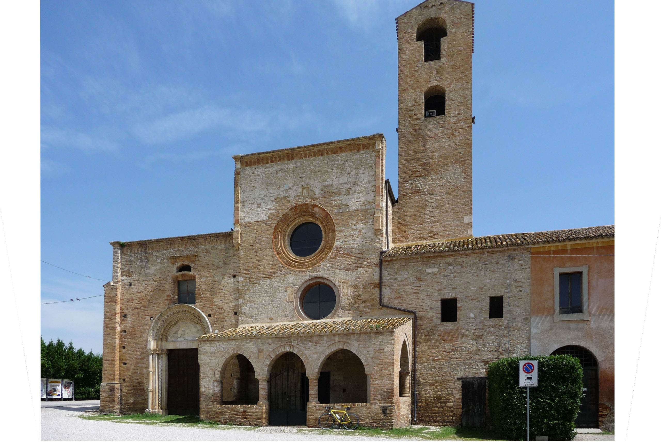 Chiesa di Santa Maria di Propezzano, edificio religioso di stile romanico presso Morro d'Oro in Provincia di Teramo, Abruzzo, Italia, esterno giorno